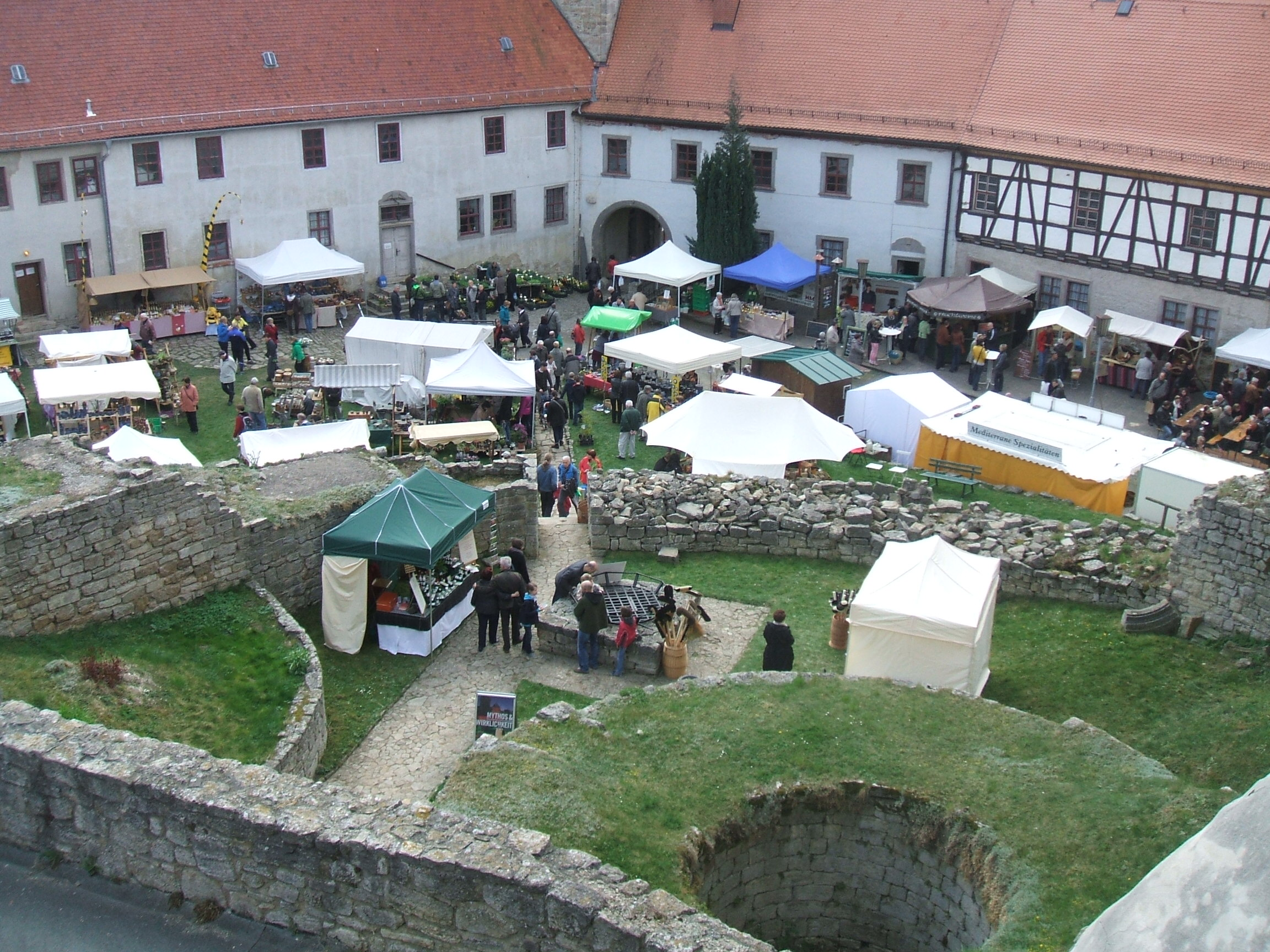 Töpfermarkt in der Wasserburg Kapellendorfm, vordere Gebäude und Innenhof